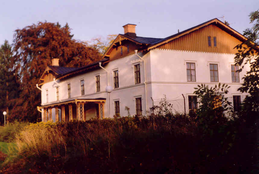 Motala verkstad, en bild tagen av Harri Blomberg i september 1992.